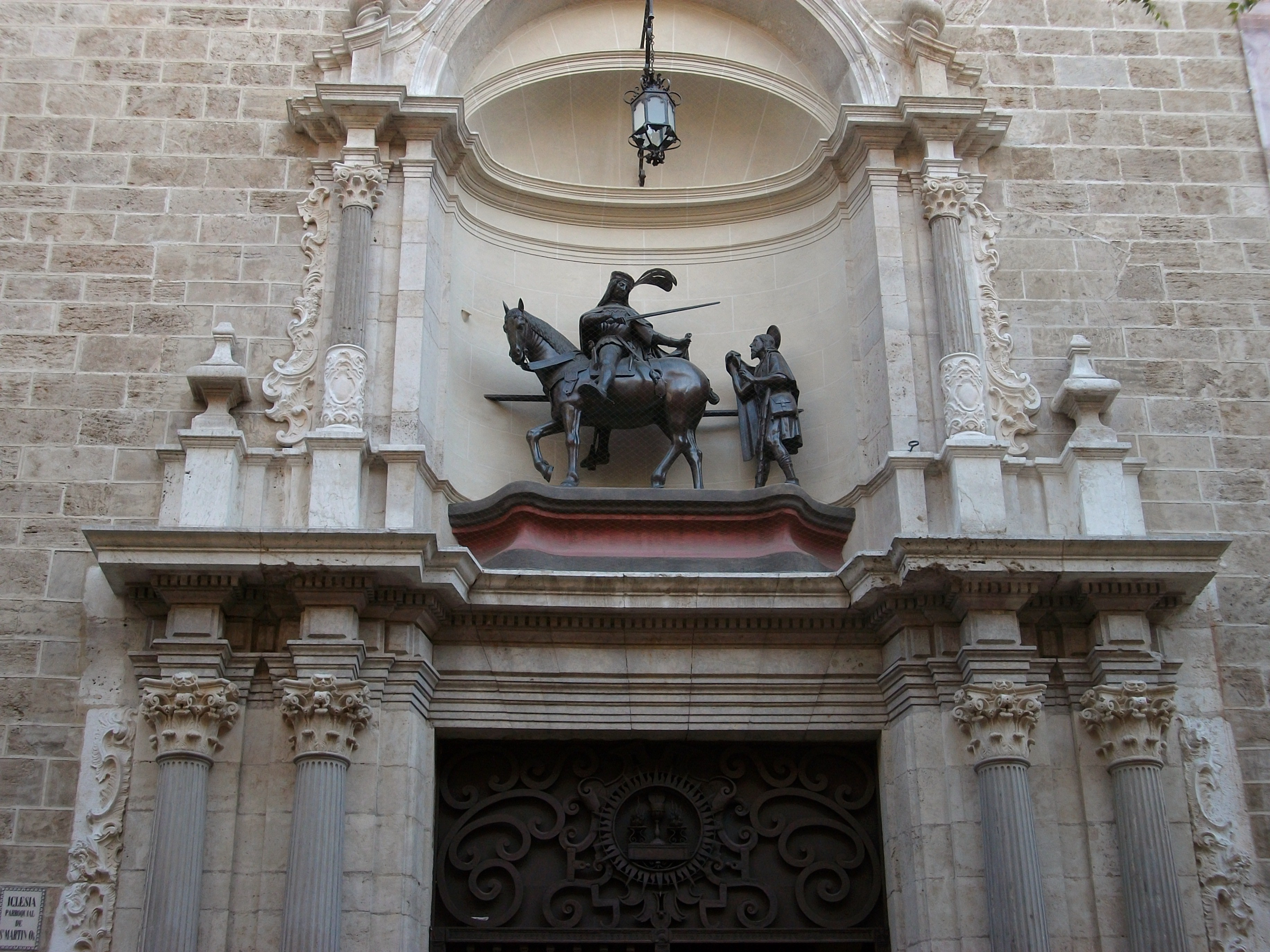 Portada de l'església de sant Martí amb l'escultura flamenca de Sant Martí i el Pobre.